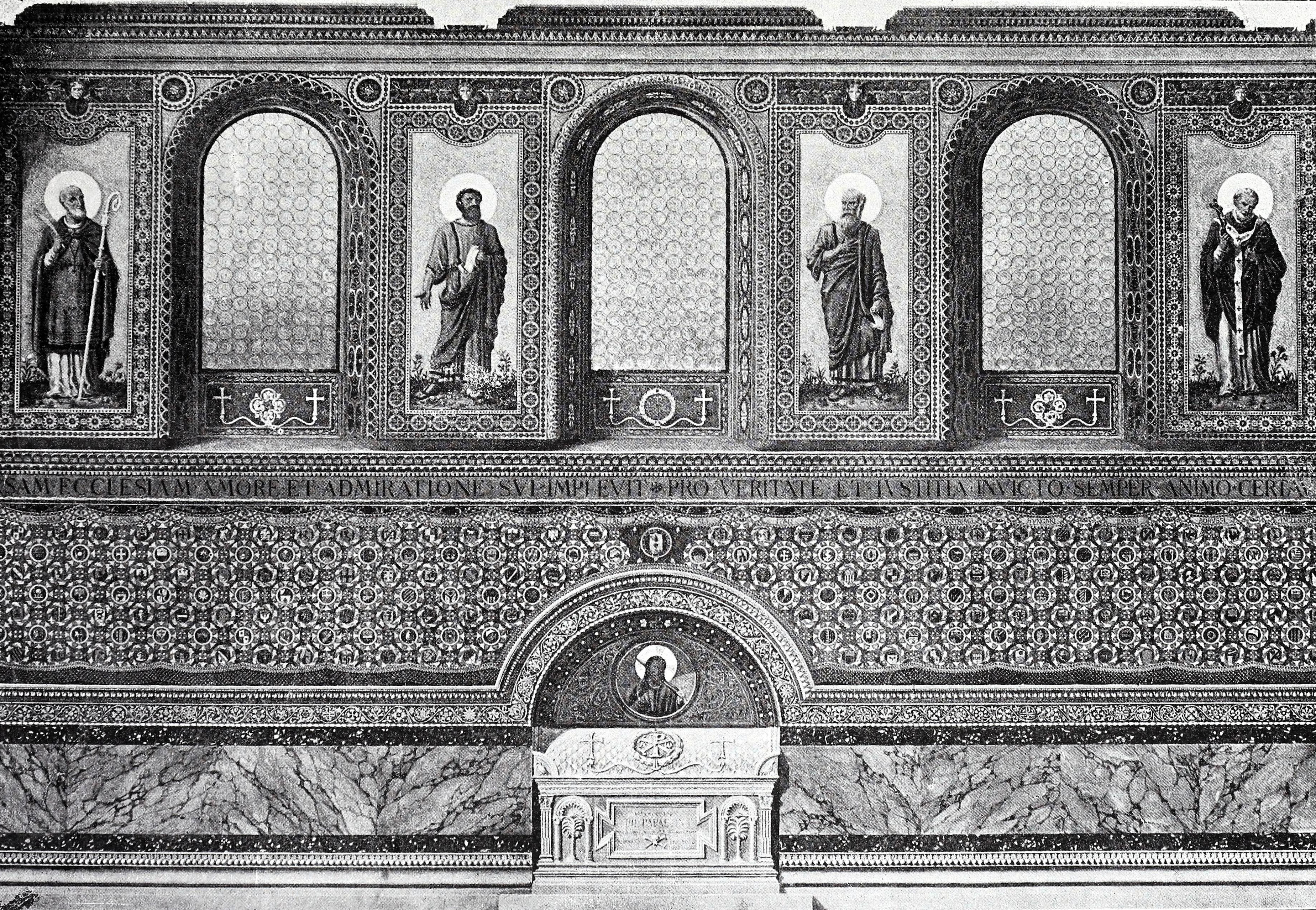 Raffaele Cattaneo, progetto di sistemazione della parete attorno alla tomba (parte centrale), Basilica di San Lorenzo fuori le mura, Roma